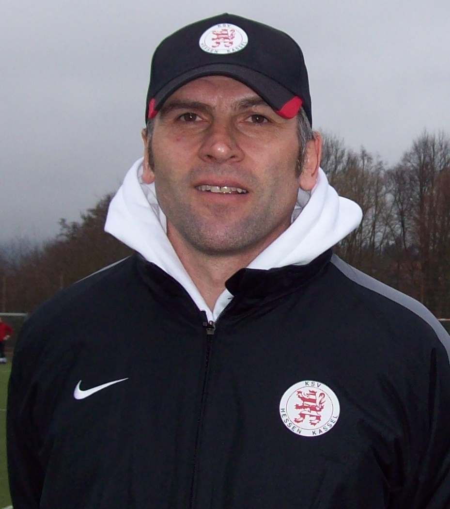 Uwe Wolf, seit 9. Januar 2012 der Cheftrainer beim Regionalligisten KSV Hessen Kassel